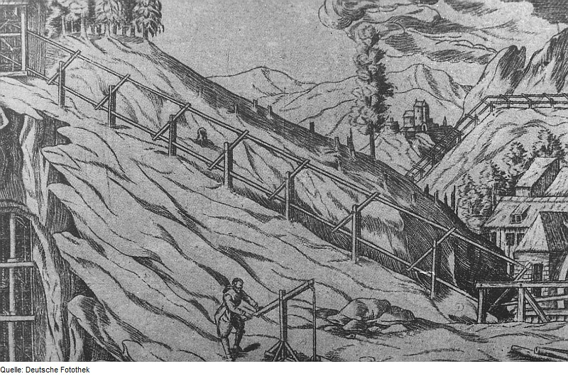 Original image description from the Deutsche Fotothek Wilsdruff-Grund. Feldgestänge, aus: Heimatkundliche Blätter Nr. 4, 1957